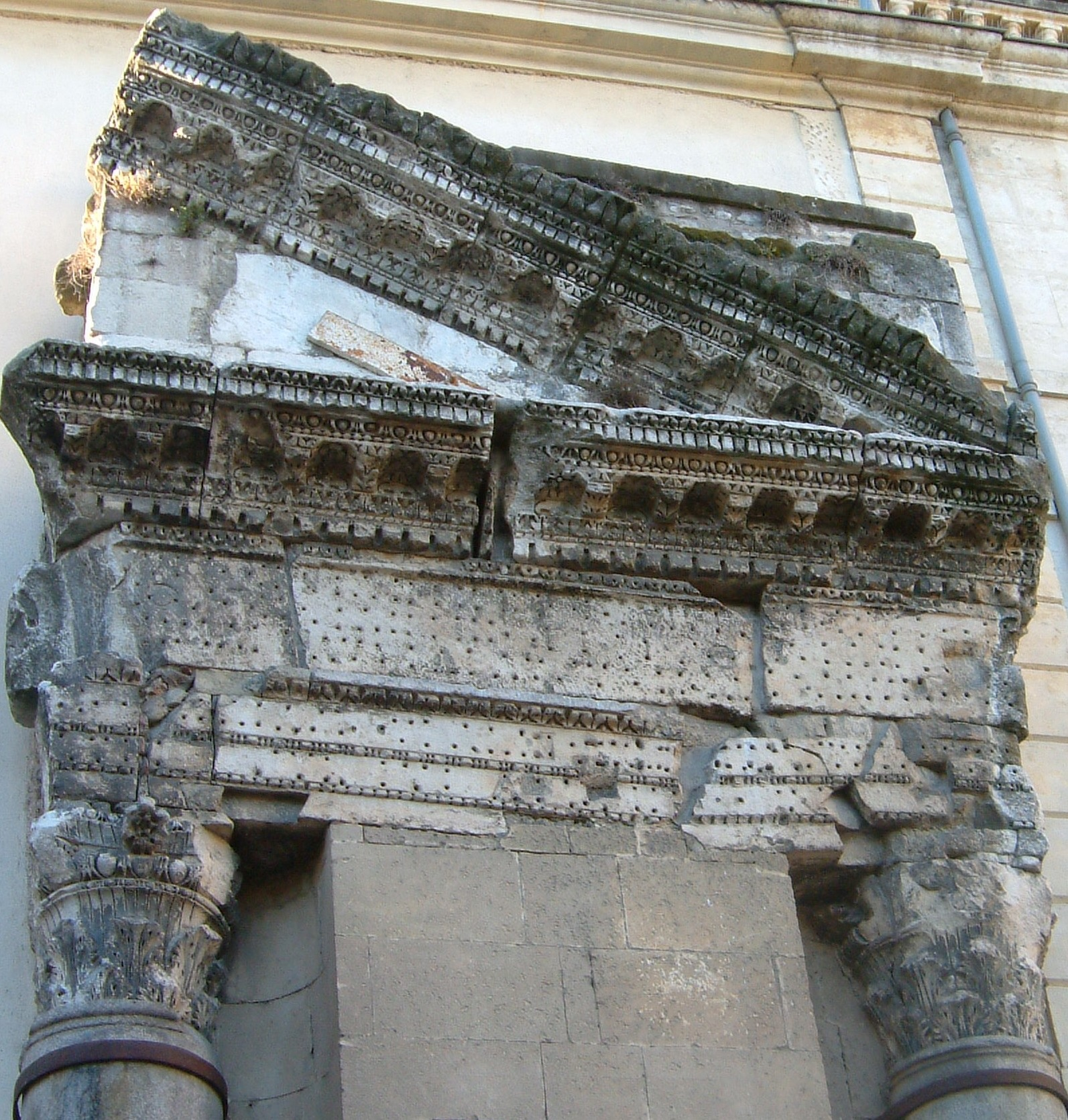 Arles: Reste aus dem römischen Gallien (Südfrankreich). Morceaux des contructions du forum replacés dans le mur d'une maison de l'actuelle place du forum. Les trous dans la pierre correspondent à l'emplacement de crampons fixant des lettres en bronze. Selon Séguier l'inscription mentionnerait Constantin. Référence : CIL XII, 668.